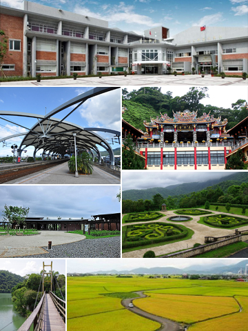 由上開始順時針方向依序為：冬山鄉公所（南興村）、草湖玉尊宮（大進村與三星鄉交界）、仁山植物園（中山村）、三奇伯朗大道（三奇村）、梅花湖與吊橋（得安村）、冬山河森林公園（太和村）、冬山火車站（冬山村）